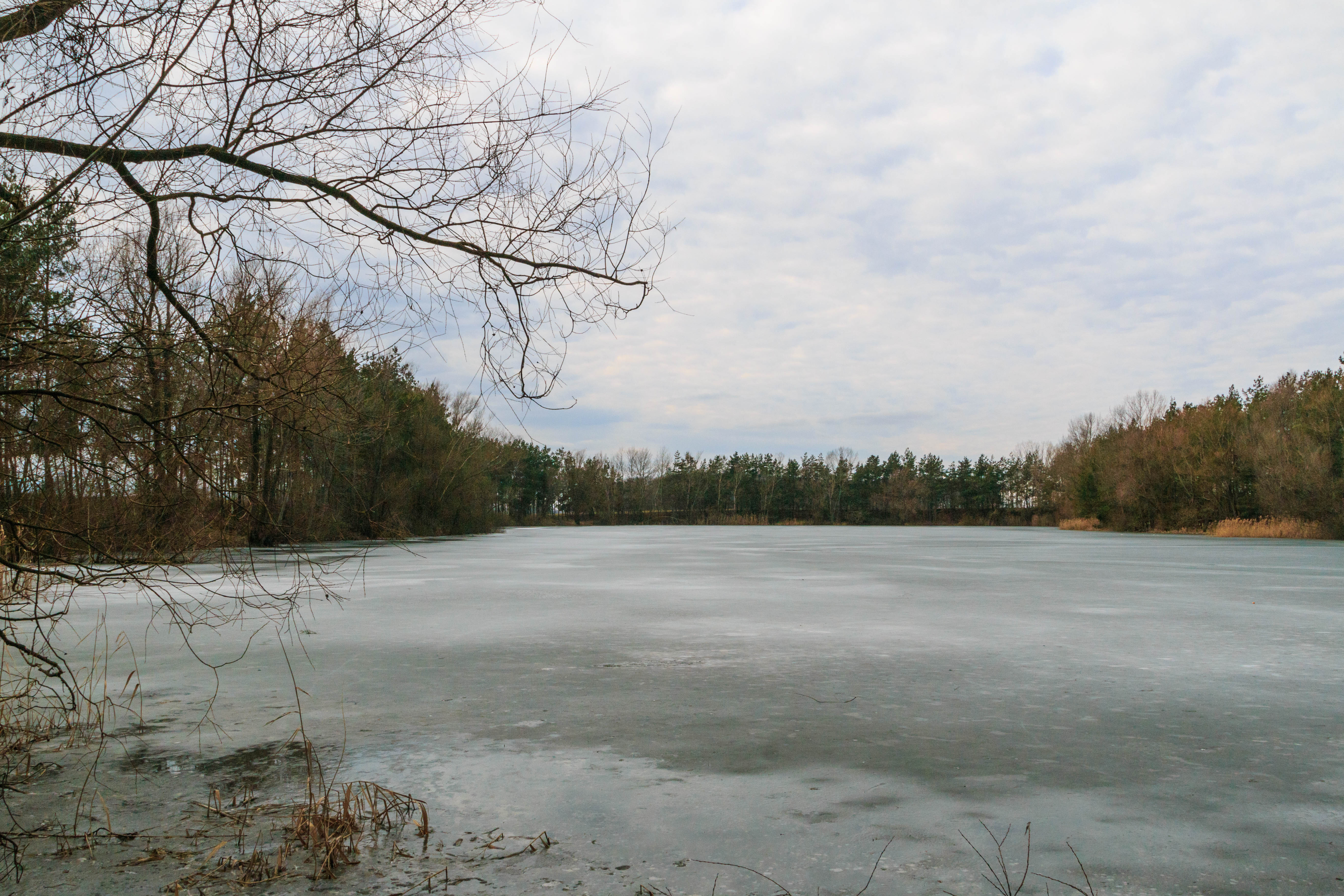 Písník u Puchlovic Project: Vodstvo.